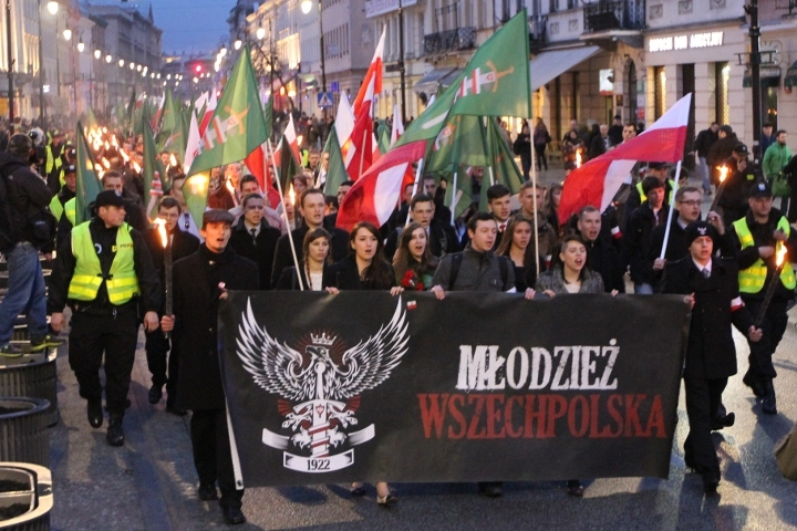 Marsz Młodzieży Wszechpolskiej w 2013 roku.